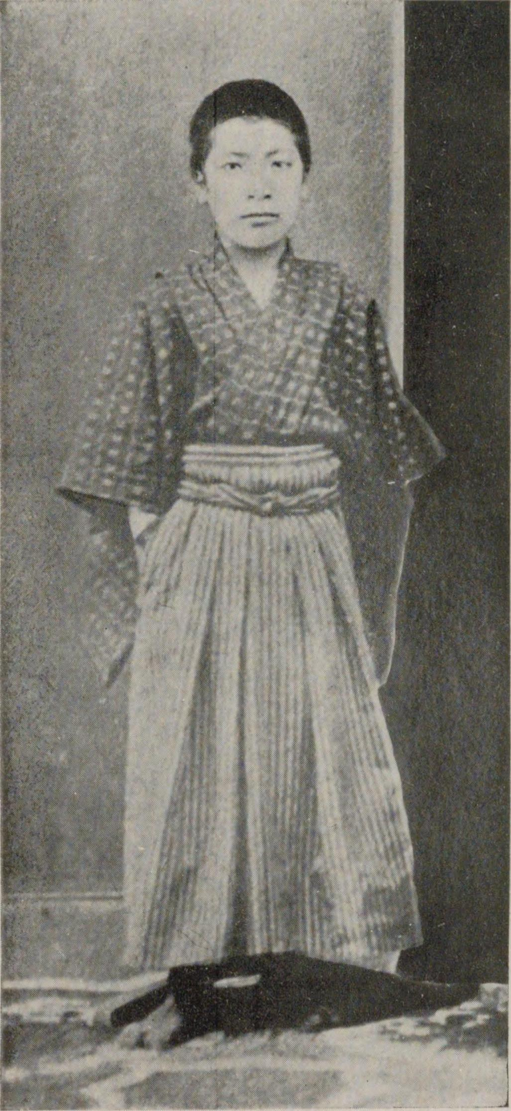 栗林五朔の少年時代